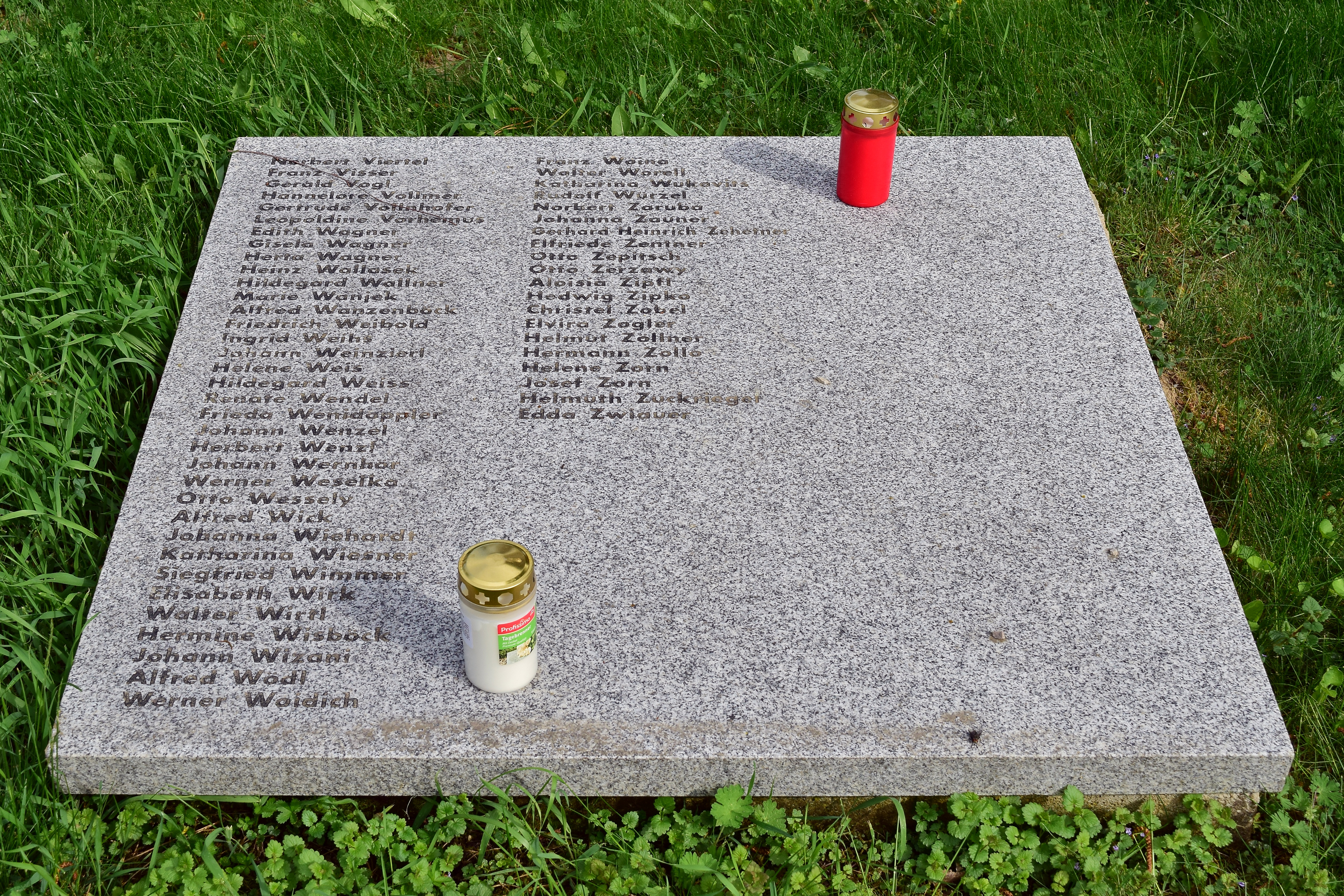 Bestattungs- und Gedenkstätte für die Opfer der NS-Justiz auf dem Wiener Zentralfriedhof